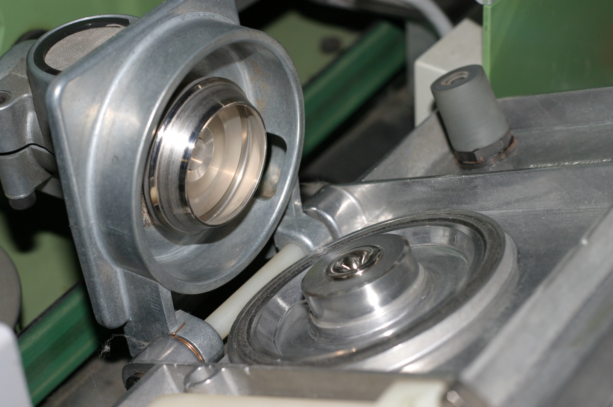 Links der Rotor einer Rotorspinnmaschine, rechts der Deckel, durch den die einzelnen Fasern zugeführt werden und das Garn abgezogen wird (kleiner Trichter). Die Maschine ist zum Fotografieren offen und nicht in Betrieb.